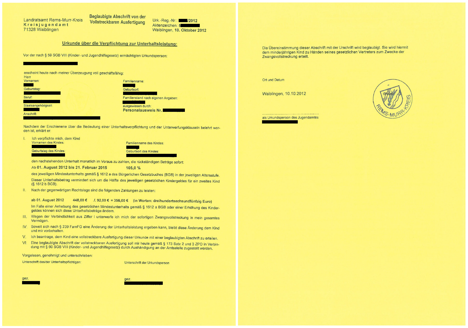 Beglaubigte Abschrift der vollstreckbaren Ausfertigung einer Urkunde über die Verpflichtung zur Unterhaltsleistung